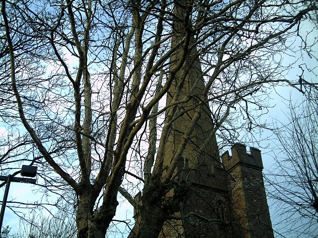 koscioł św. Marii w Bridgwater